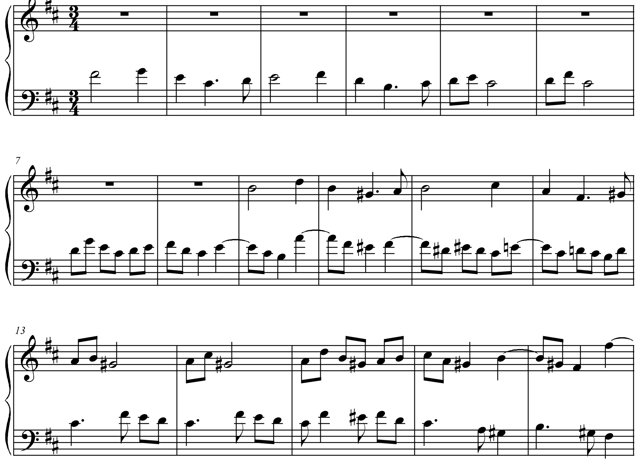 Extrait de partition de l'Opus 18 de Franck : Fugue